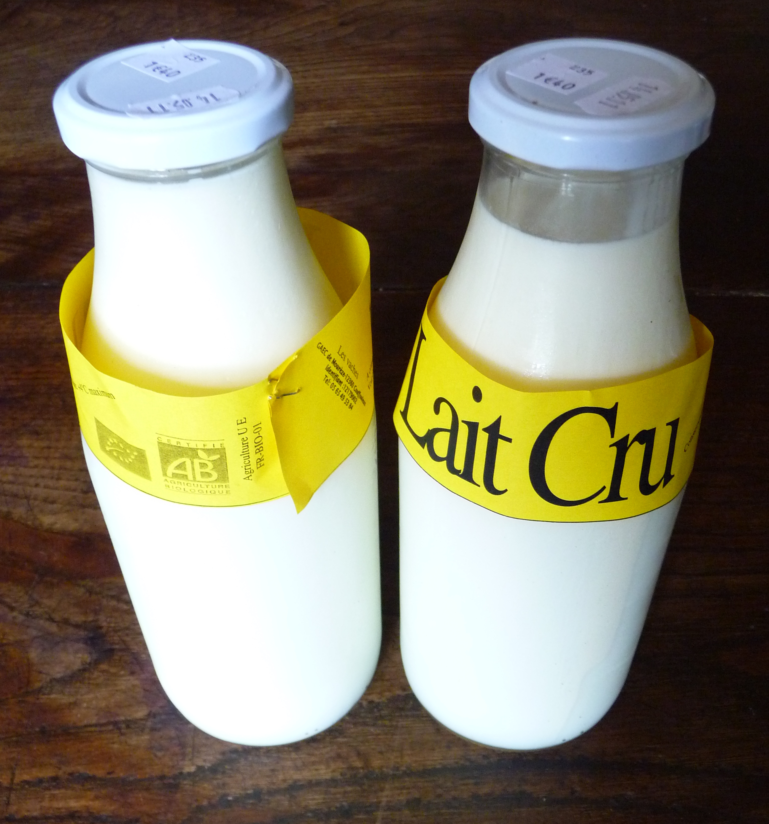 Bouteilles du commerce, lait cru de vache du GAEC de la Mourèze, Aveyron (Massif central), France.